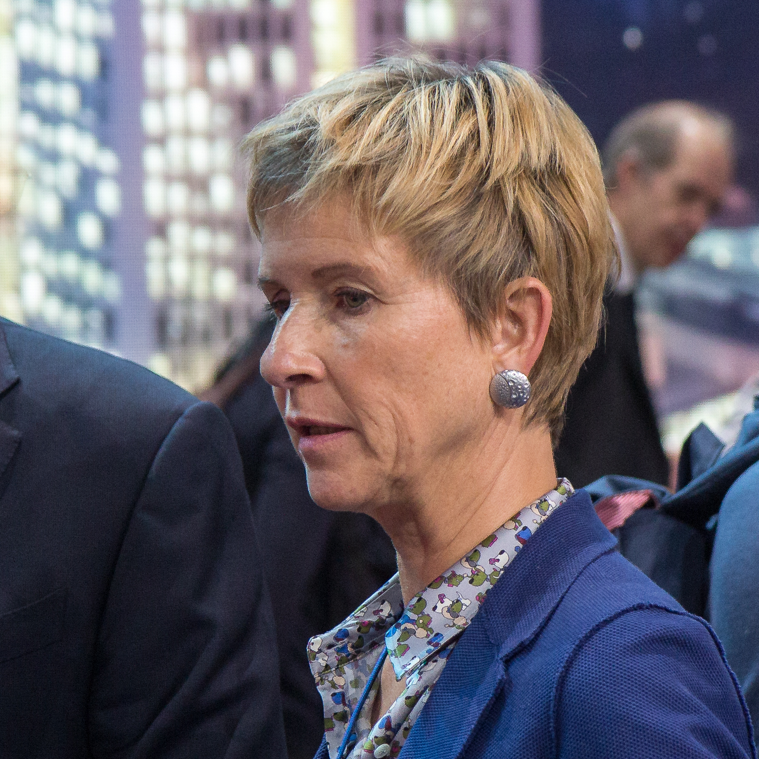 Susanne Klatten auf dem Messestand von BMW auf der IAA 2017 in Frankfurt